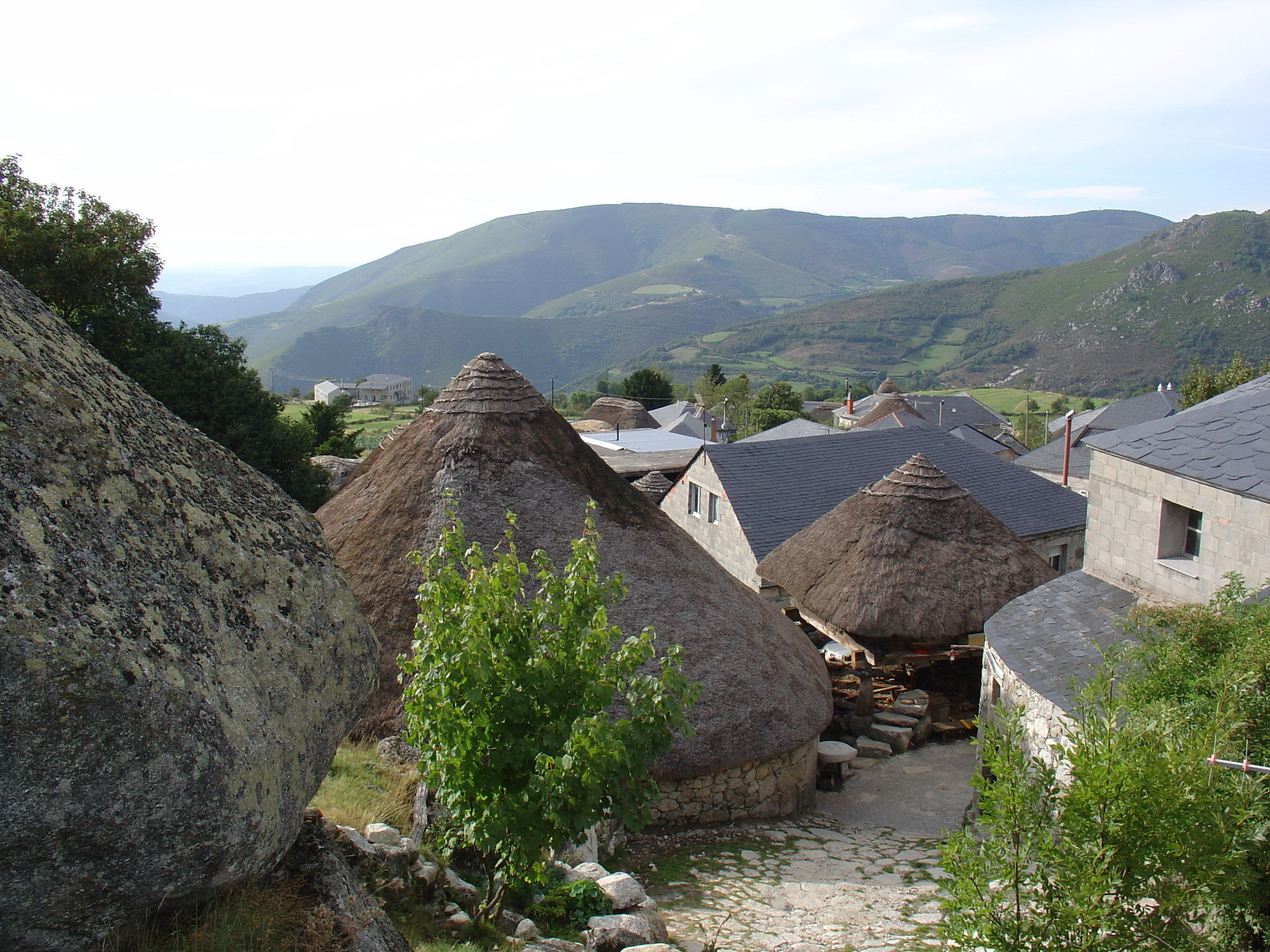 Piornedo de Ancares - Cervantes - Lugo